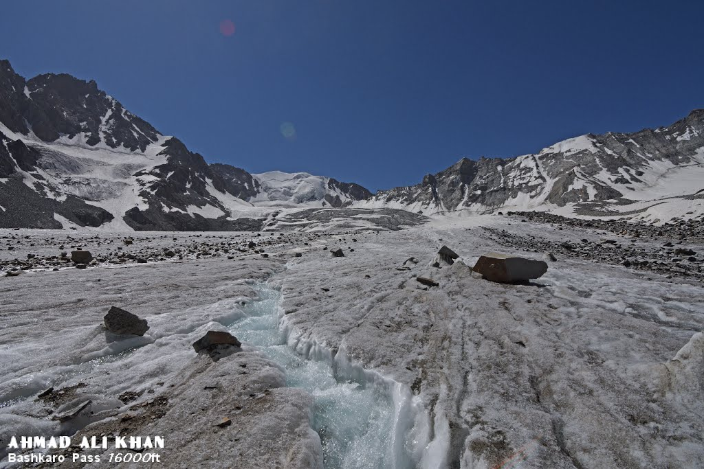 Bashkaro Pass 16000ft